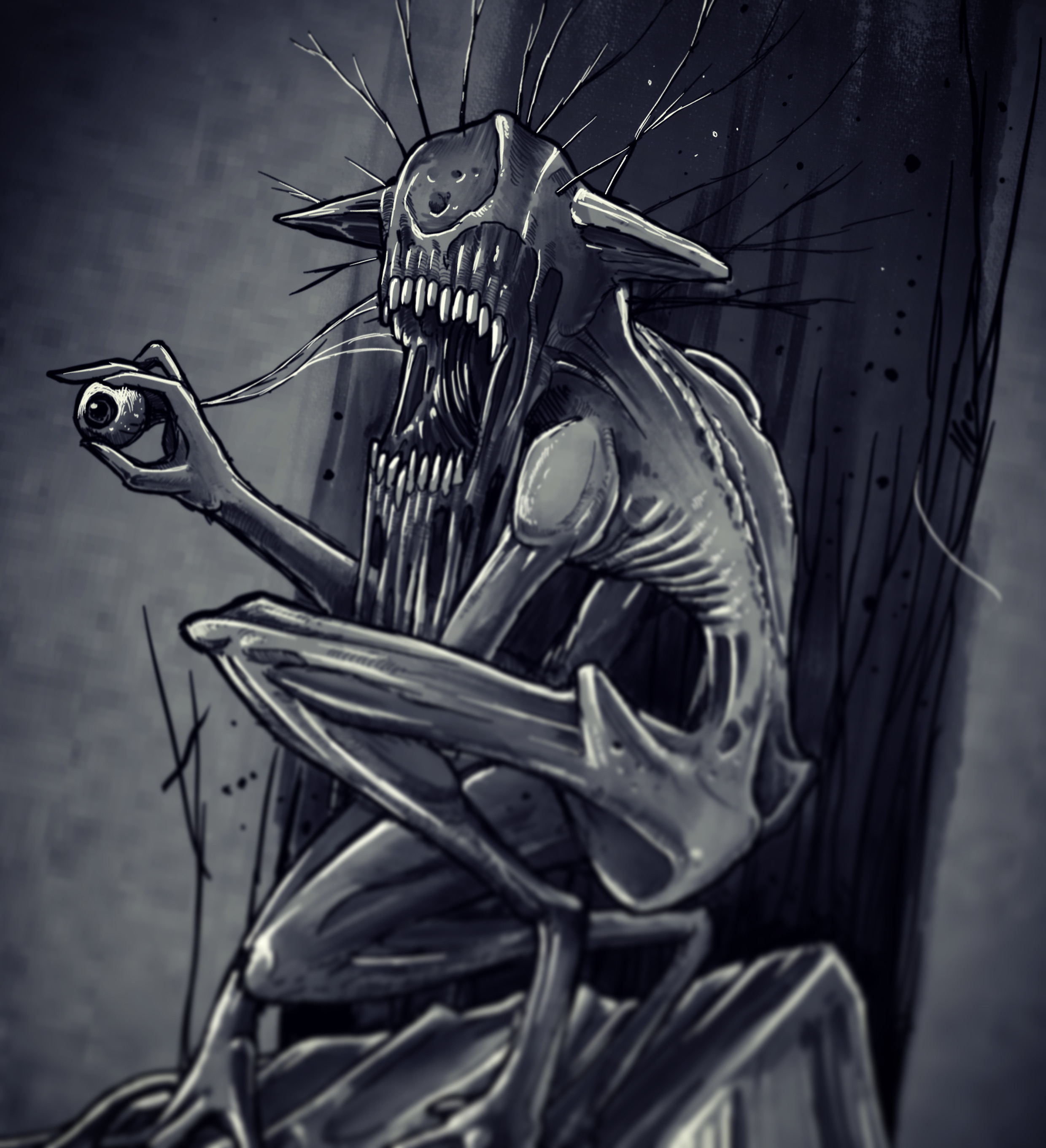 Bane/Zmora - personifikacja paraliżu sennego w wierzeniach słowian